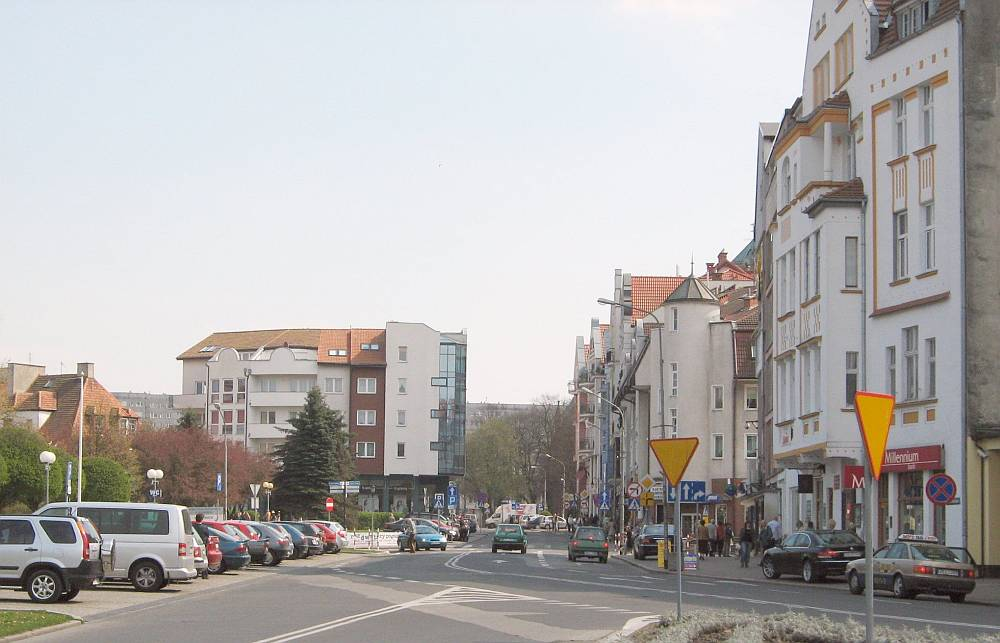 Kołobrzeg. Ulica Armii Krajowej w centrum miasta.